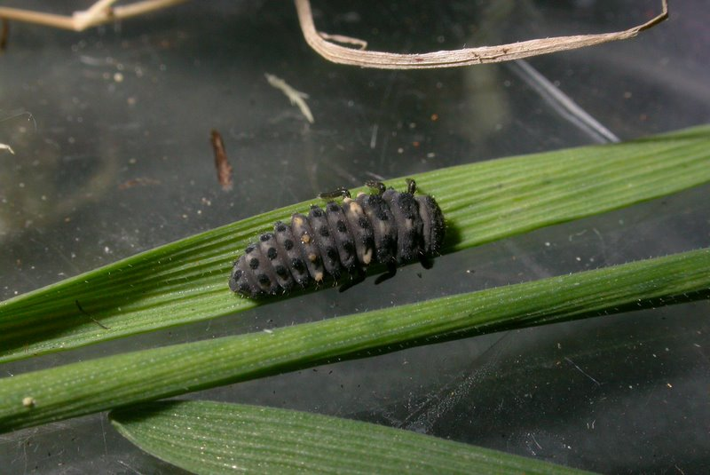 Hippodamia tredecimpunctata larva